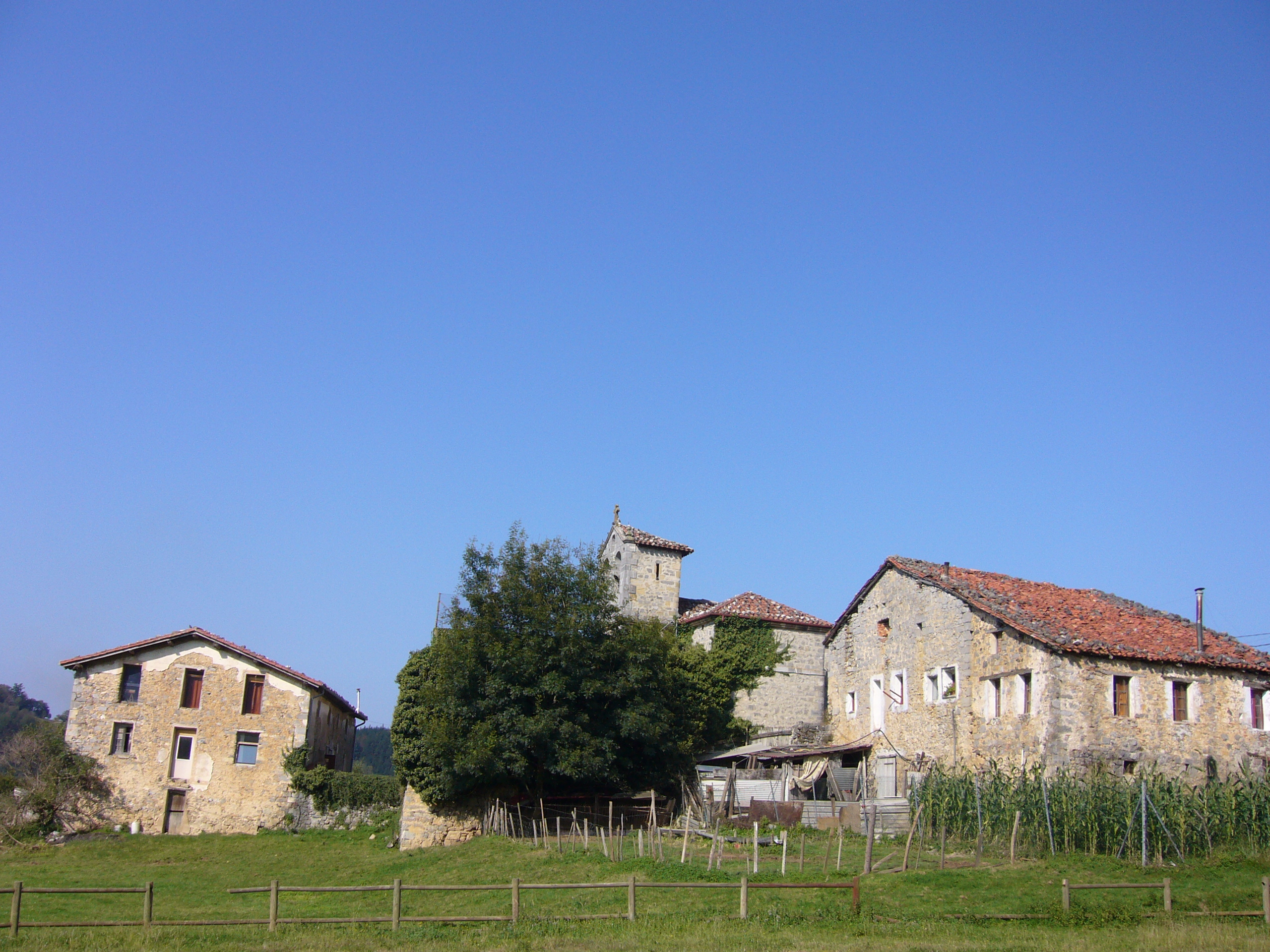 Altzola auzoko kaskoa